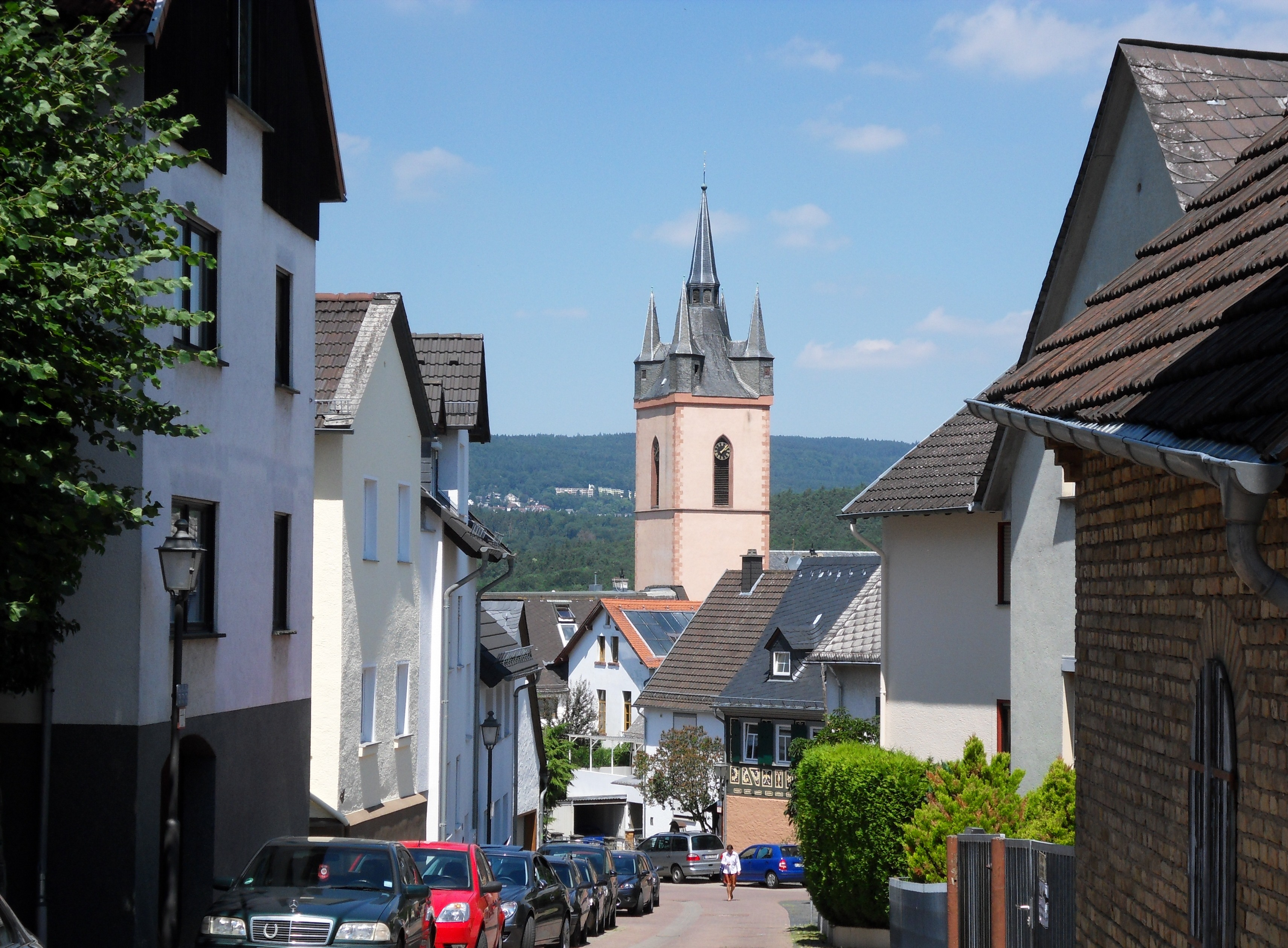 Blick von der Weinbergstraße nach Norden Richtung Ortsmitte mit dem Turm der Pfarrkirche St. Antonius